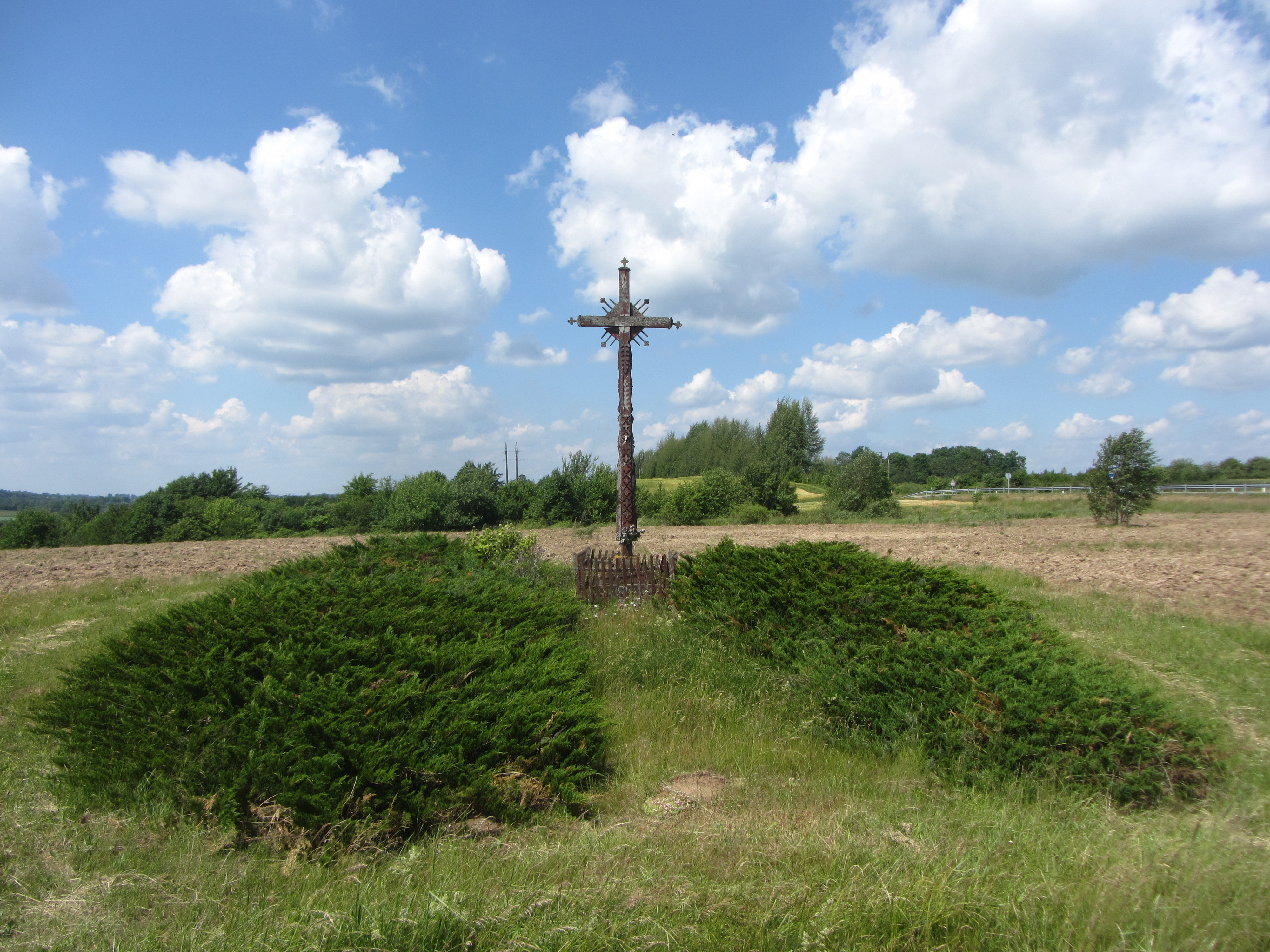 Jiezno sen., Lithuania